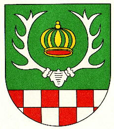 Wappen von Leisel